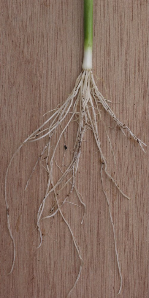 zelfgemaakte foto van wortelstelsel van prei